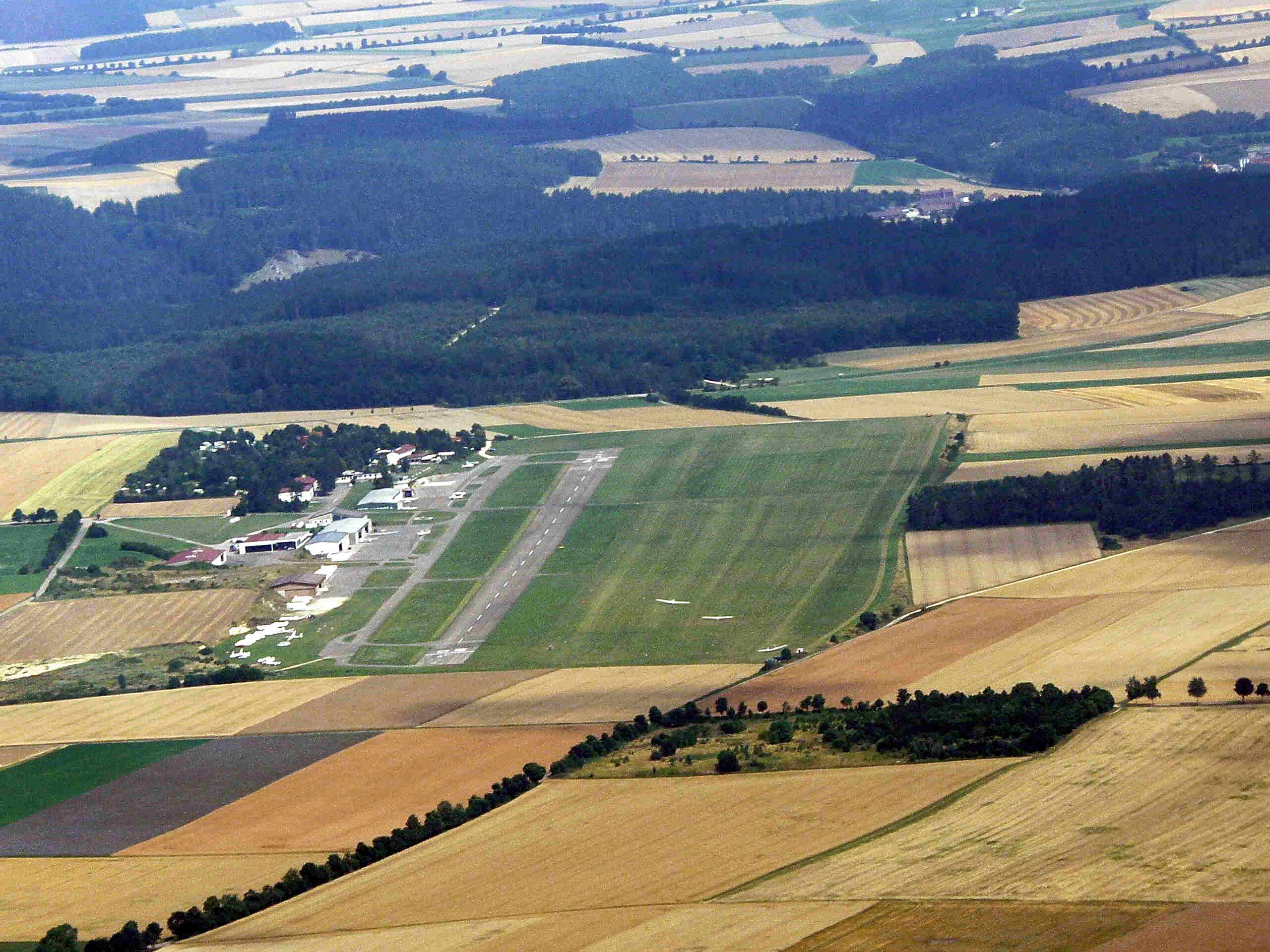 Der Flugplatz Aalen-Heidenheim aus westlicher Richtung